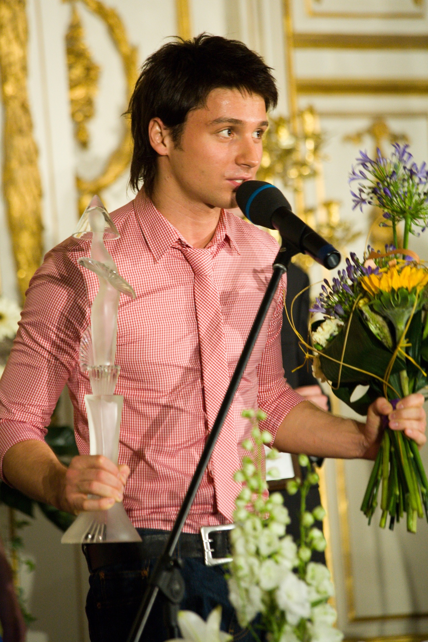 Сергей Лазарев на церемонии вручения премии "Хрустальная турандот" в 2006 г.